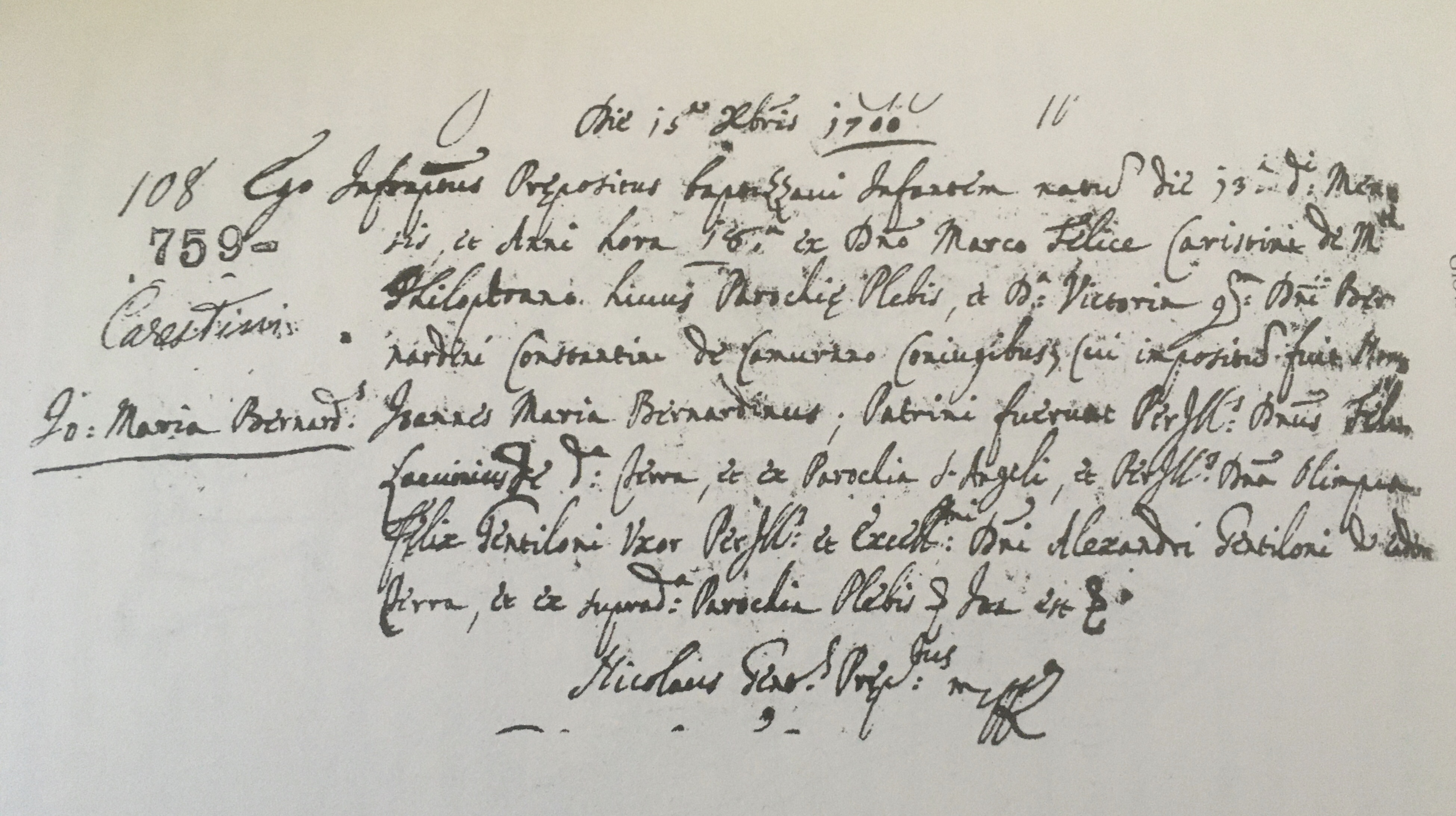 Dal "Libro dei Battezzati" della Parrocchia di Santa Maria Assunta. Archivio parrocchiale, "Libro dei Battezzati", iniziato nel gennaio 1694 e terminato nel settembre 1703. Volume contrassegnato dalla lettera H